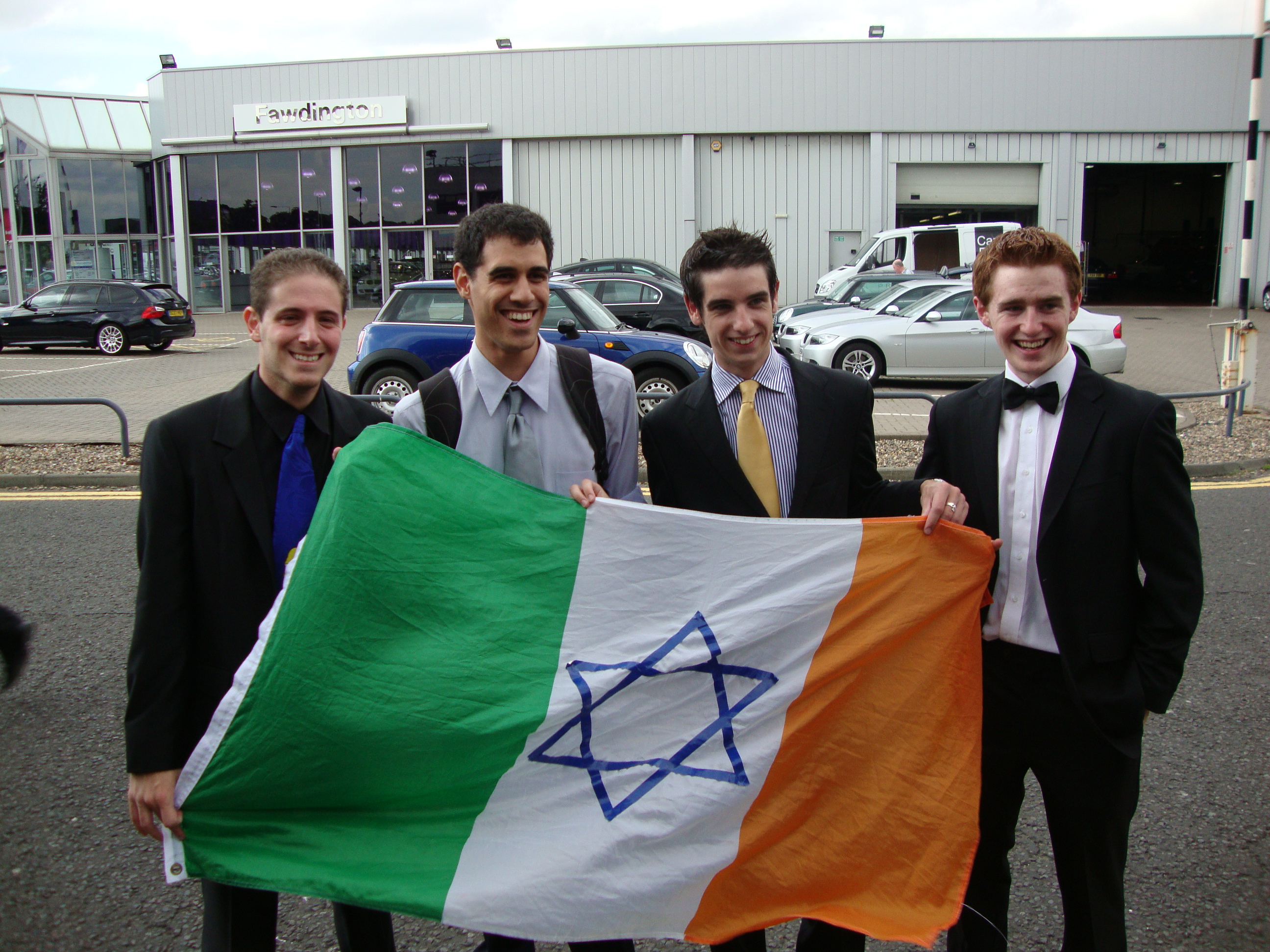 יוני כהן אידוב ואורי מרחב יחד עם הדגל הישראלי-אירלנדי באליפות העולם בדיבייט לאוניברסיטאות 2010